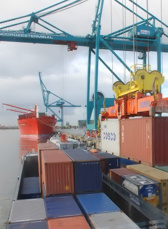 Grupagem maritima